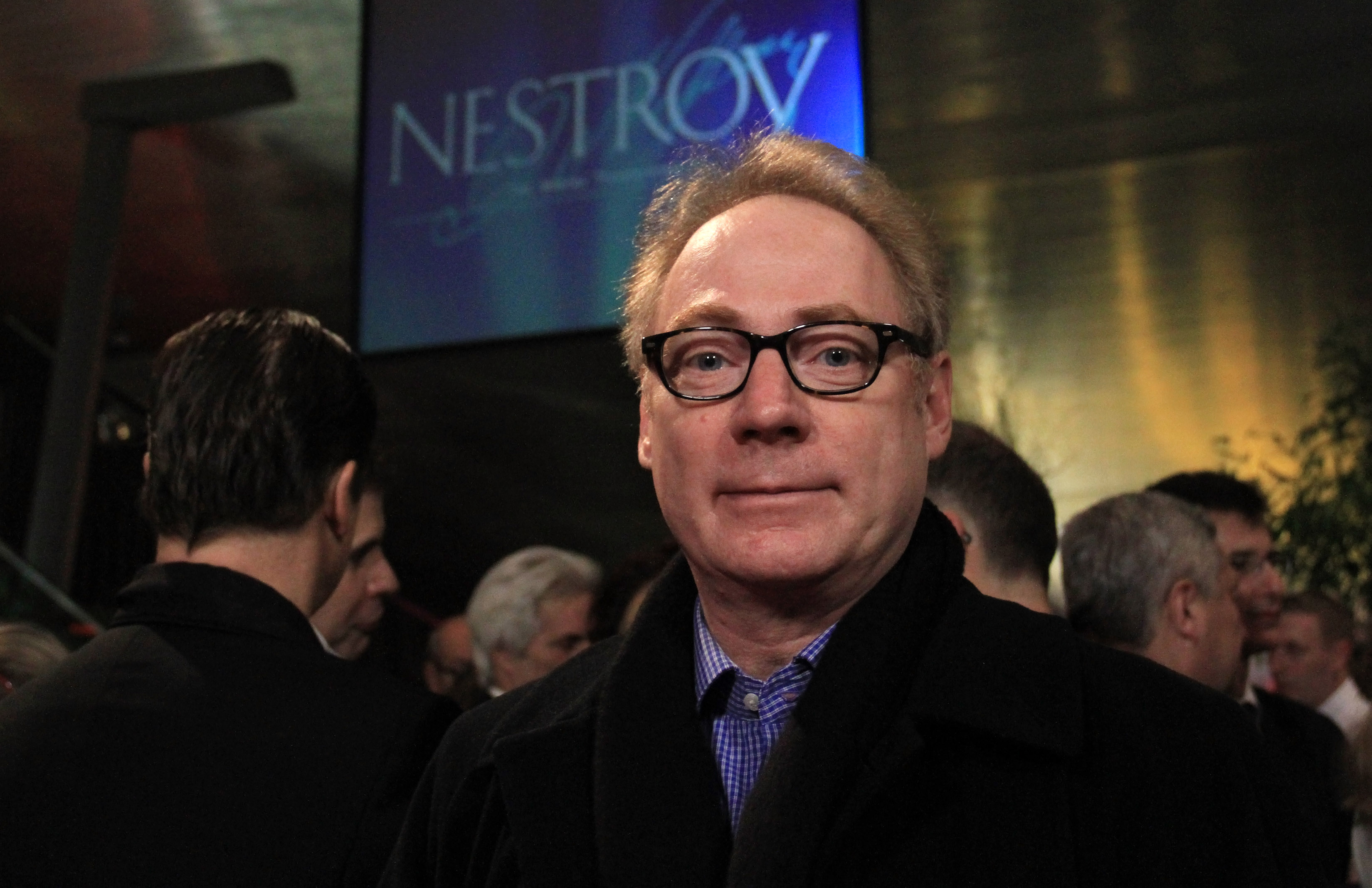 André Pohl beim Nestroy-Theaterpreis 2012 im MuseumsQuartier in Wien.